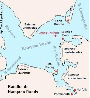 Mapa das movimentações na Batalha de Hampton Roads.